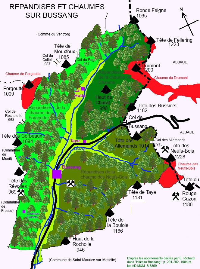 Bussang, chaumes et répandises de l'ancien régime